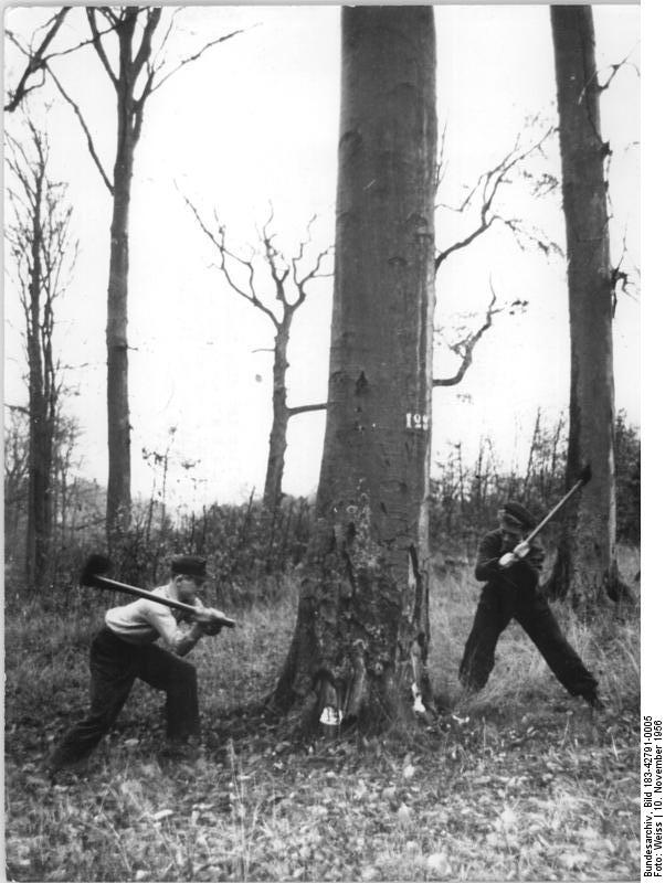 Roßla, Ausbildung zum Forstfacharbeiter Zentralbild Weiss 10.11.1956 Ausbildung junger Forstfacharbeiter. Inmitten der Wälder des Kyffhäusergebirges liegt das Lehrlingswohnheim "Ernst Thälmann" des Staatlichen Forstwirtschaftsbetriebes Roßla. Dort wohnen und lernen zur Zeit 39 Jungen und 7 Mädchen. sie werden dort in zweijähriger Lehrzeit zu guten Forstfacharbeitern ausgebildet. Die Lehrlinge werden von ihren Lehrausbildern mit allen in der Forstwirtschaft vorkommenden Arbeiten vertraut gemacht. Sie es nun die Ausbildung im Holzeinschlag, seien es Wegebau, Walderneuerung, praktischer Forstschutz und nicht zuletzt die Pflege aller Werkzeuge. Sie lernen alles kennen und beherrschen, was ein Forstfacharbeiter, der auf jedem Arbeitsgebiet der Forstwirtschaft spezialisiert werden kann, wissen muss. Nach abgeschlossener Lehrzeit können die jungen Forstarbeiter in Jugendbrigaden arbeiten oder sich auf Forstfachschulen und Brigadeleiterschulen weiter qualifizieren. UBz: Das fachgerechte Baumfällen ist eine Kunst für sich. Die Lehrlinge Uwe Becker und Anton Körn, die im 2. Lehrjahr stehen, haben es schon gelernt. (Rechts) Uwe hackt den Fallkerb, die die Richtung bestimmt, in die der Baum fallen soll.